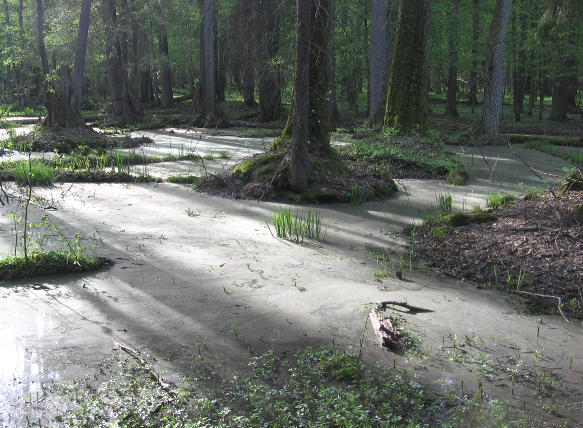 Ols, fragment rezerwatu ścisłego w Puszczy Białowieskiej.